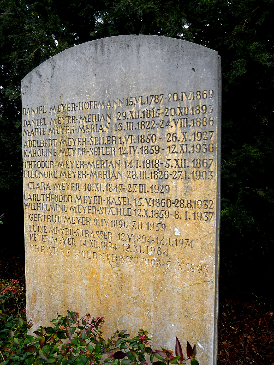 Carl Theodor Meyer-Basel (1860–1932) Künstler, Radierer, Maler, Grafiker, Mitbegründer der Schweizer Grafikvereinigung Die Walze, Familiengrab auf dem Friedhof Hörnli, Riehen, Basel-Stadt